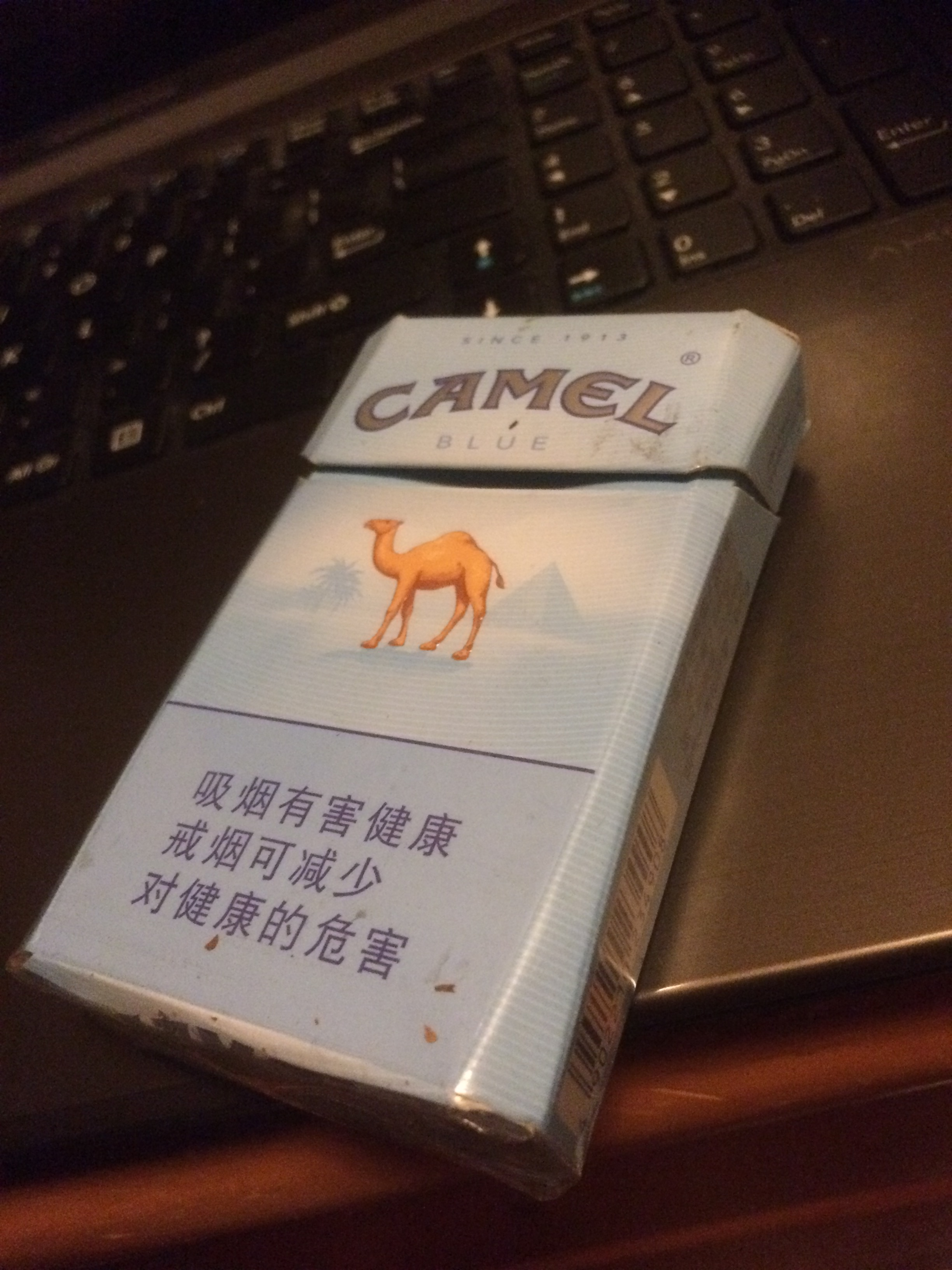 Chinese pack of Camel blue cigarettes